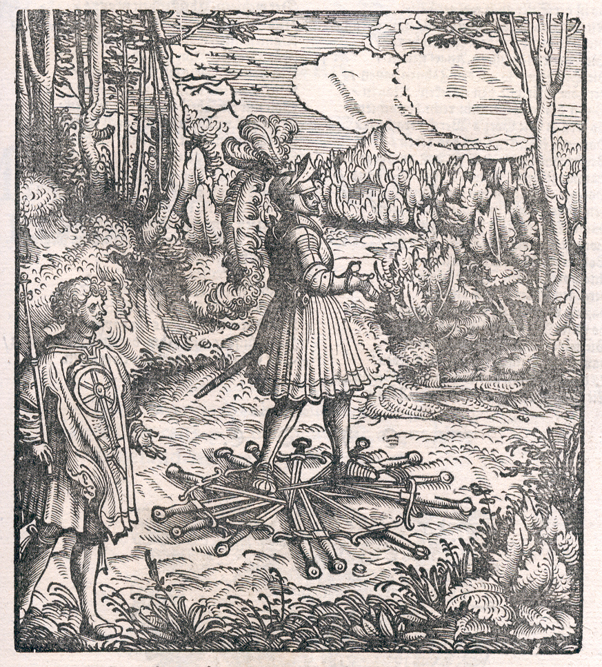 Theuerdank. Illustration zu Kapitel 118 (Aus der Ausgabe von 1679, die die alten Druckstöcke von 1517 verwendete)